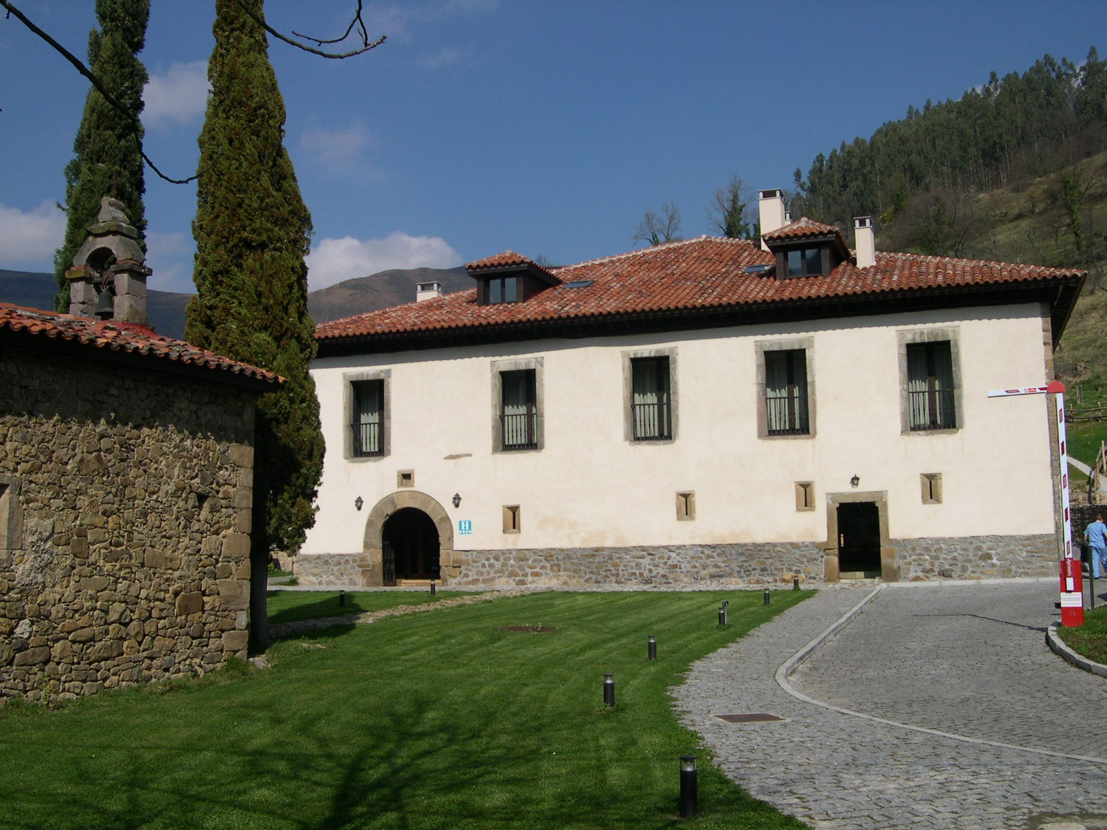 Palaciu d'arriba del sieglu XVIII en Cenera, Asturies